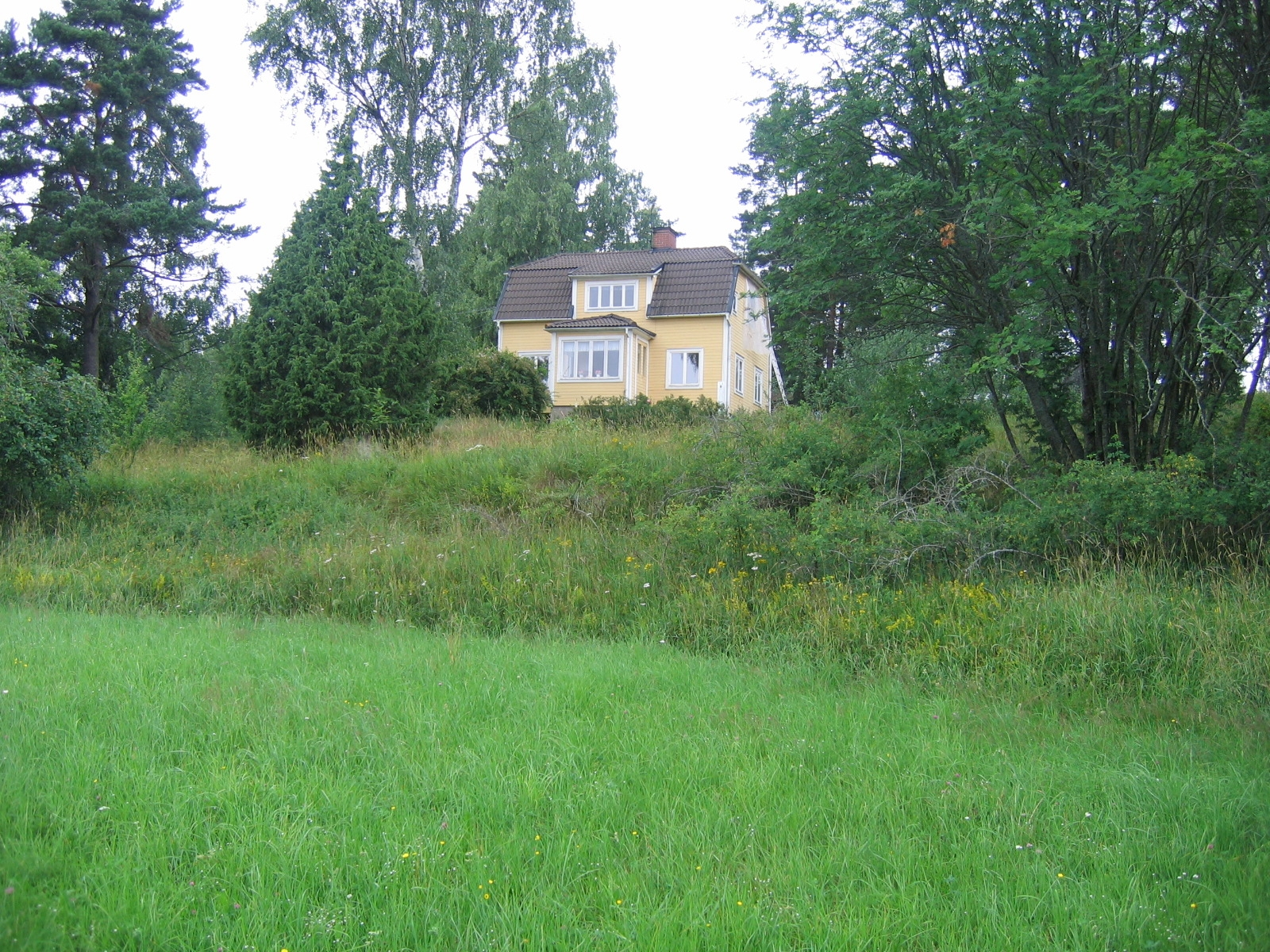 Risbyle